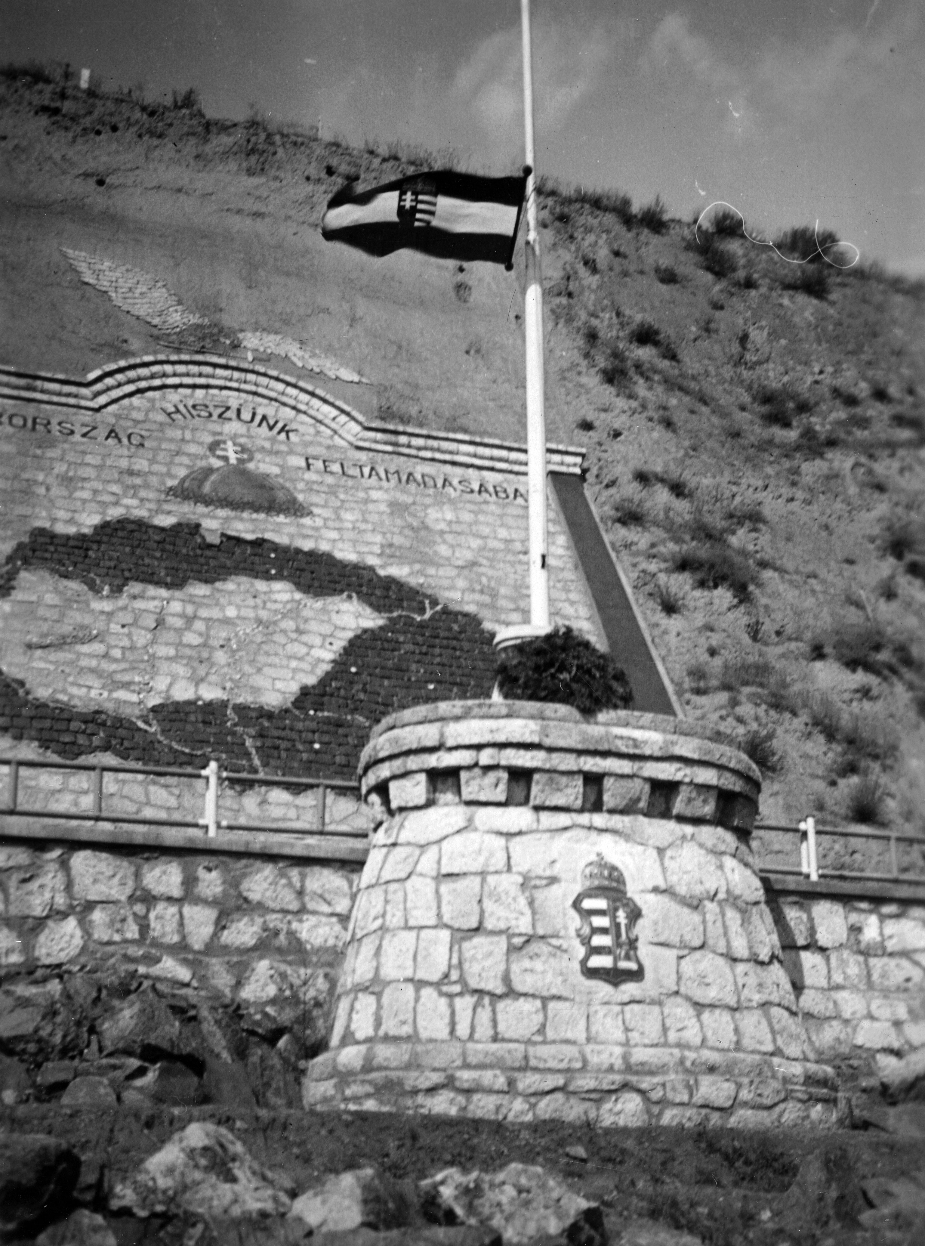 országzászló. Location: Hungary Tags: monument, crest, flag Title: országzászló.